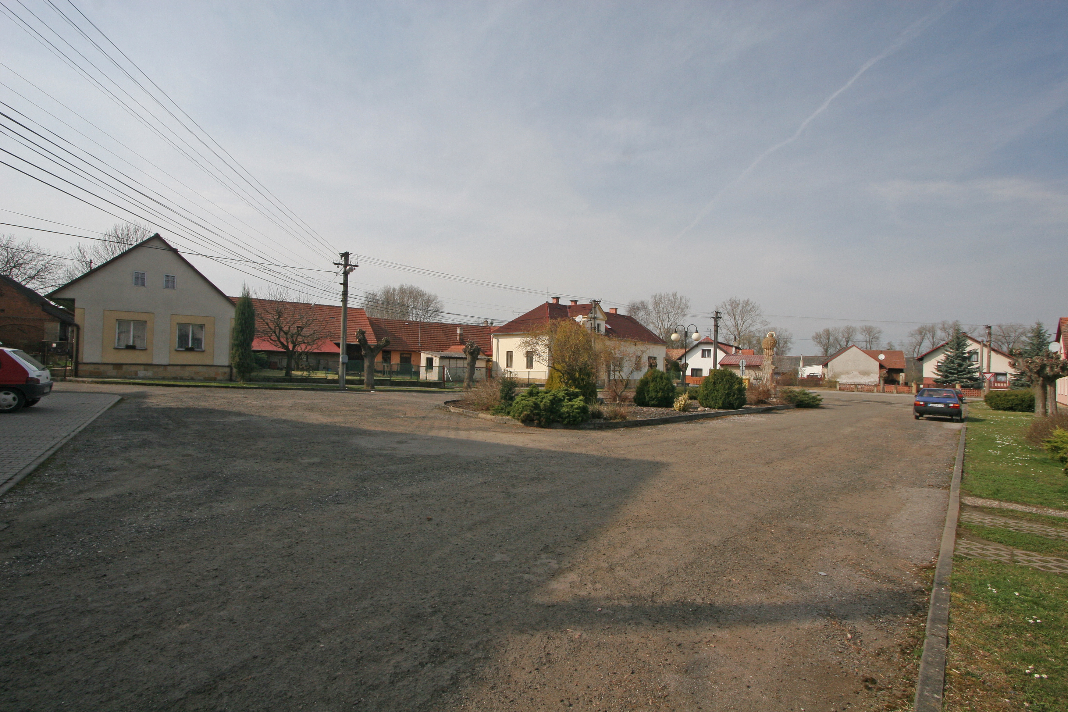 Žeretice náměstí